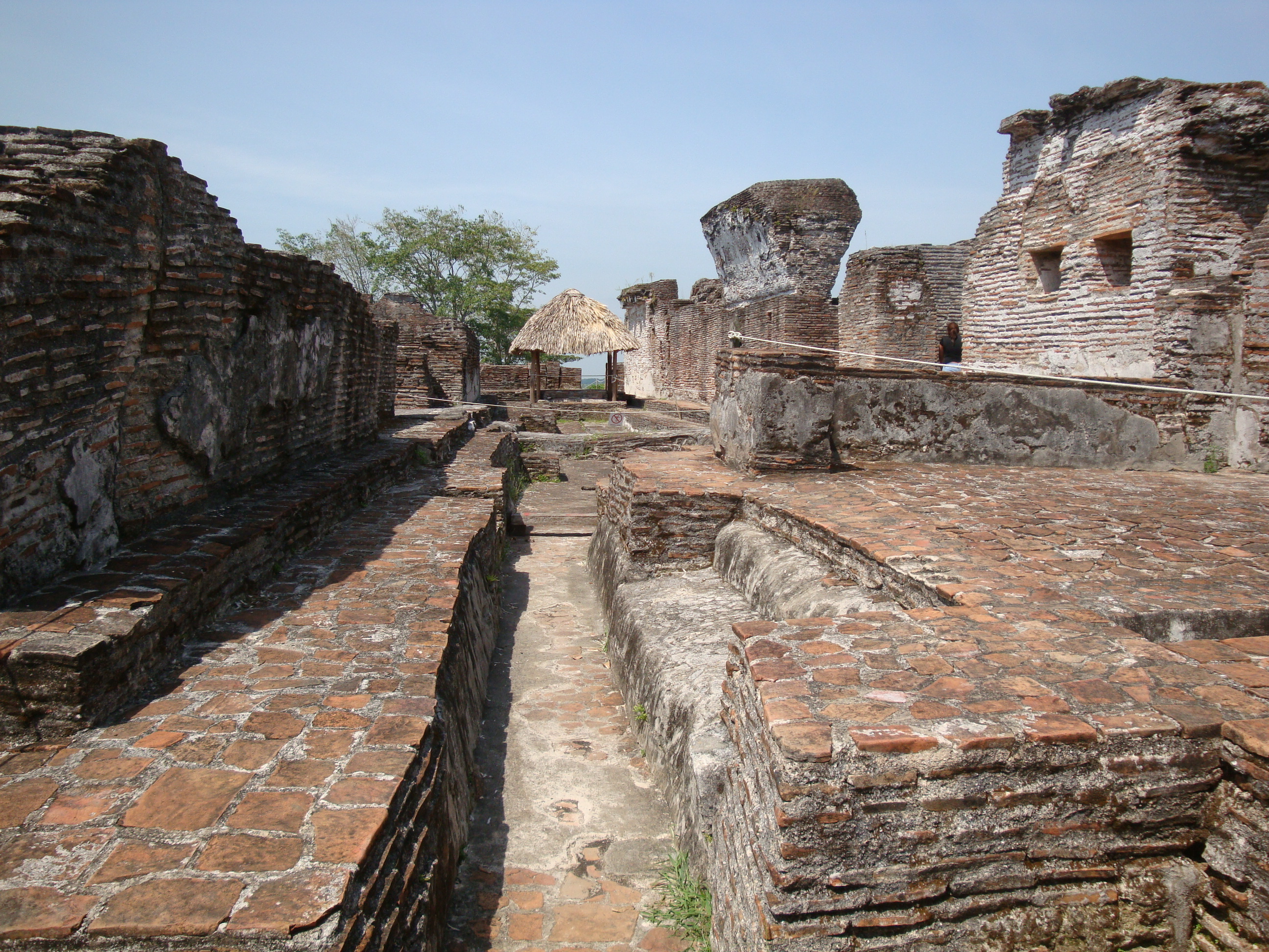 Panorámica interior de La Gran Acrópolis, en donde se aprecia la red de canales de desagüe, que servían para drenar el agua de los edificios circundantes. Ciudad maya de Comalcalco, Tabasco, México.